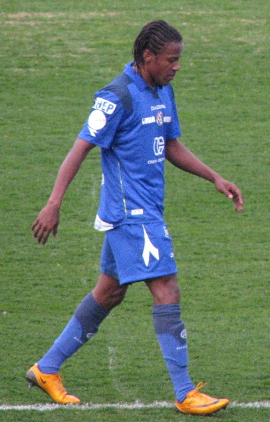 Luiz Paulo Hilario Dodo